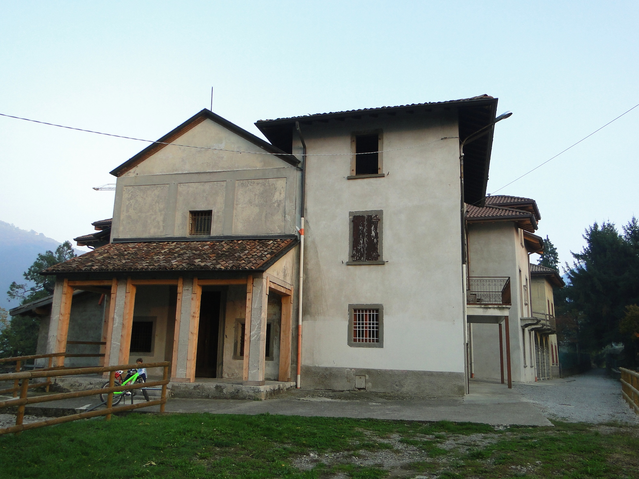 Fiobbio (fraz. di Albino), Chiesa Ss. Trinità